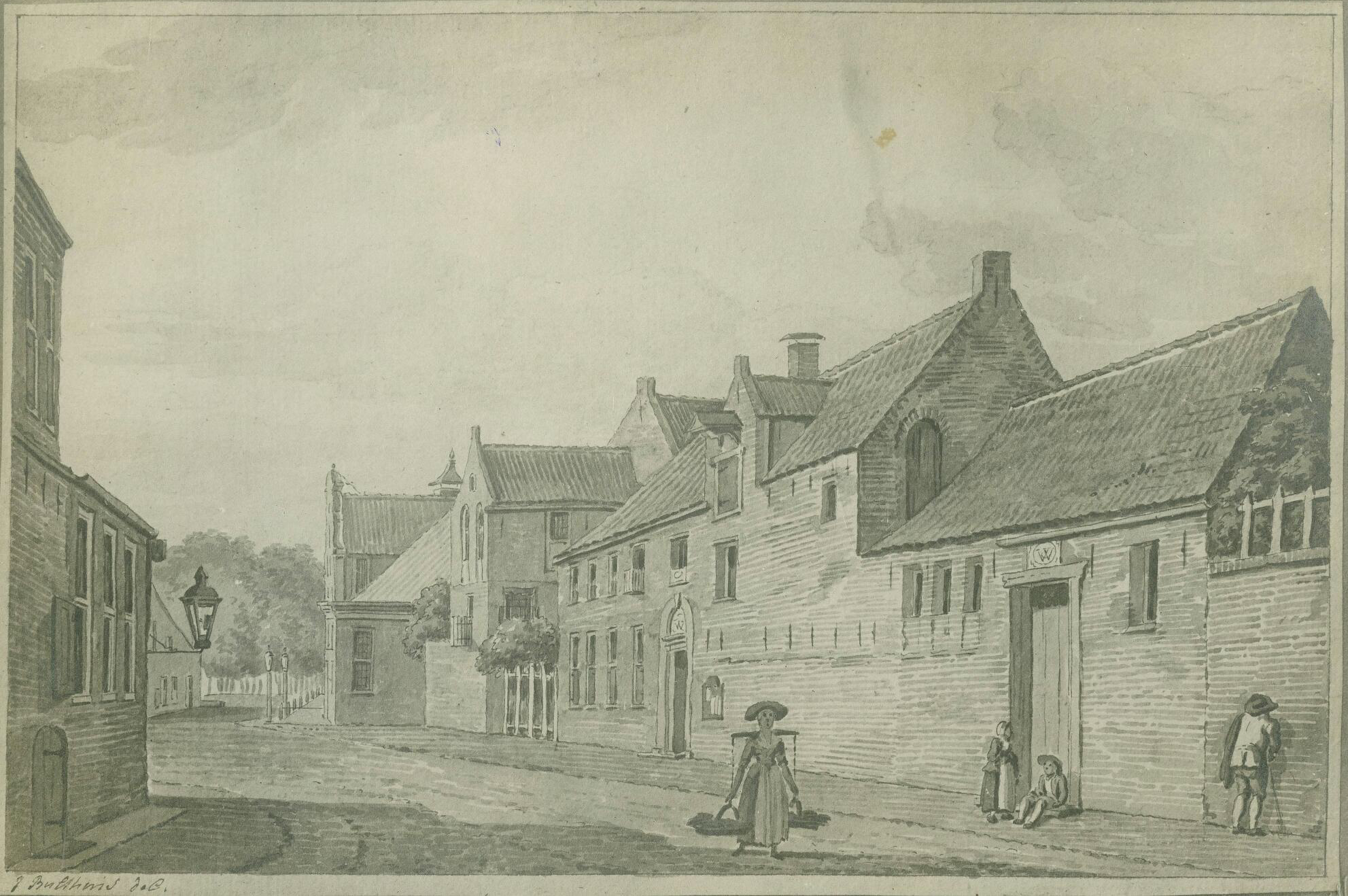 Aquarel van West-Indisch Huis aan Munnekeholm in Groningen